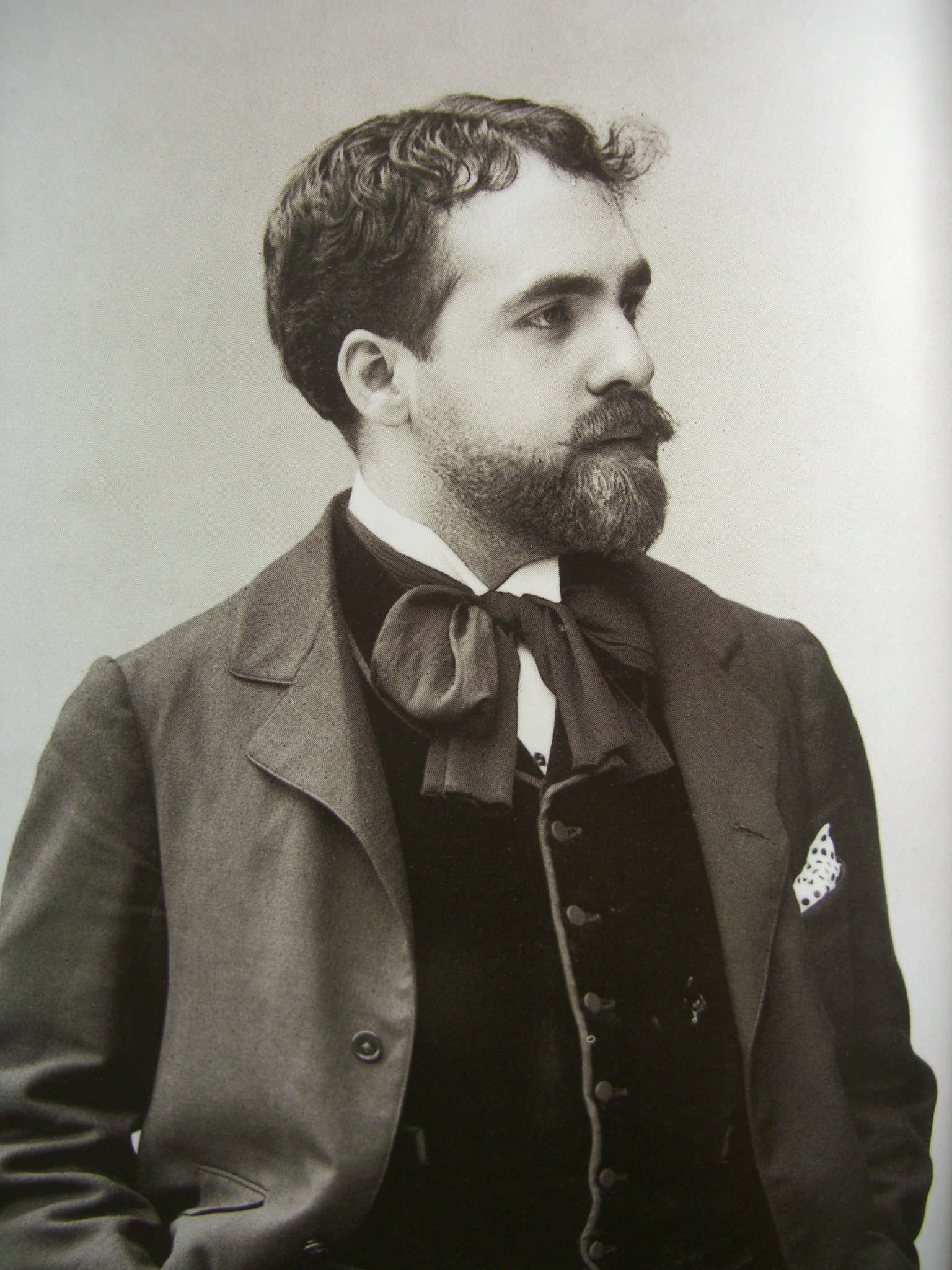 Reynaldo Hahn (1874-1947), chef d’orchestre et compositeur français.